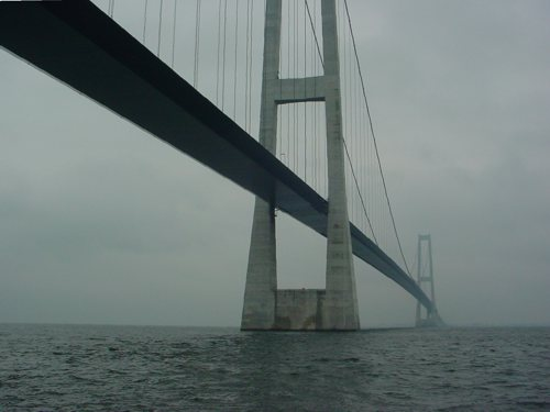 Brücke über den Großen Belt. Blick vom Wasser aus Richtung Osten.